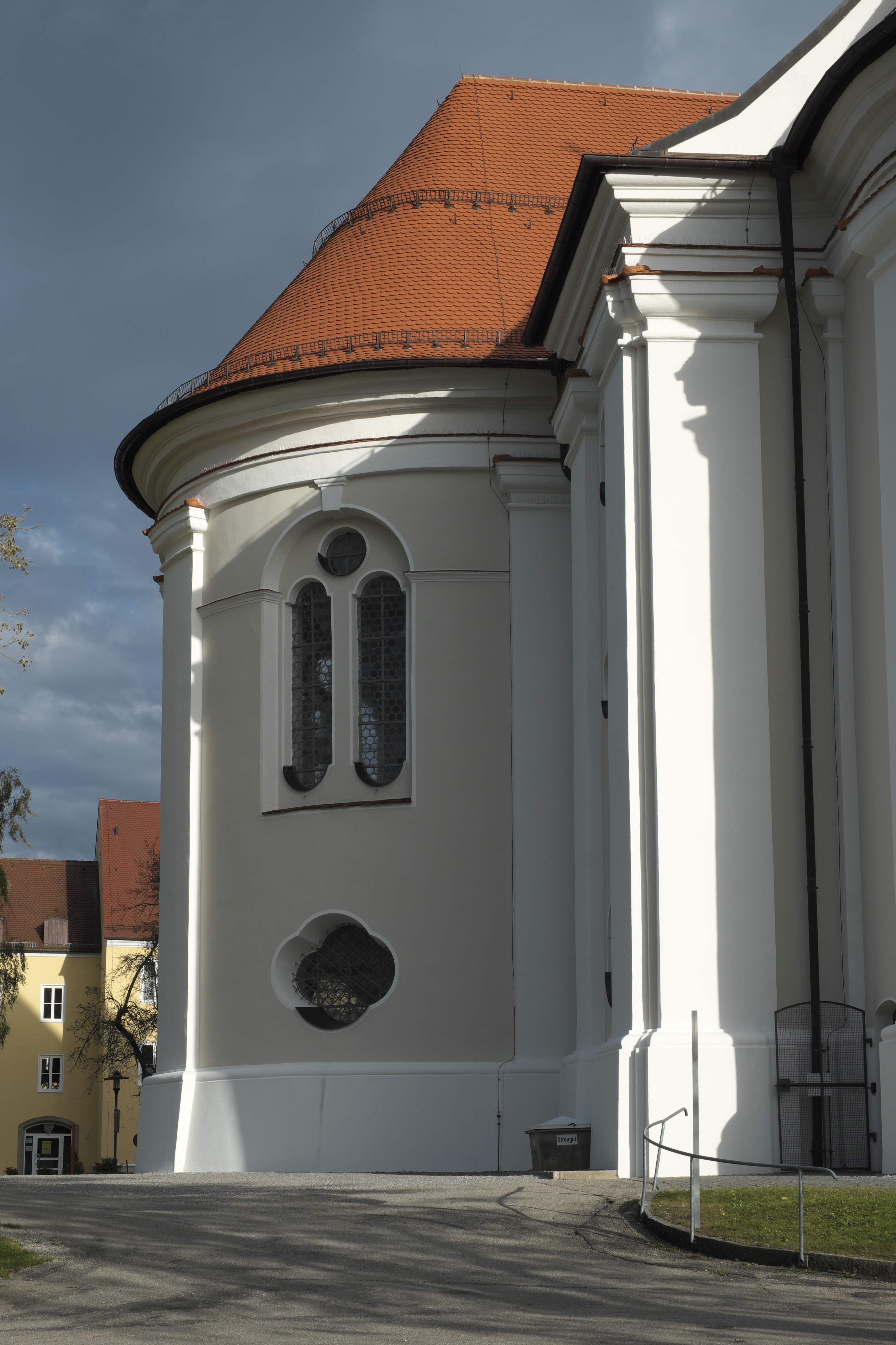 Katholische Wallfahrtskirche Mariä Schmerzen in Vilgertshofen im Landkreis Landsberg am Lech (Bayern/Deutschland)